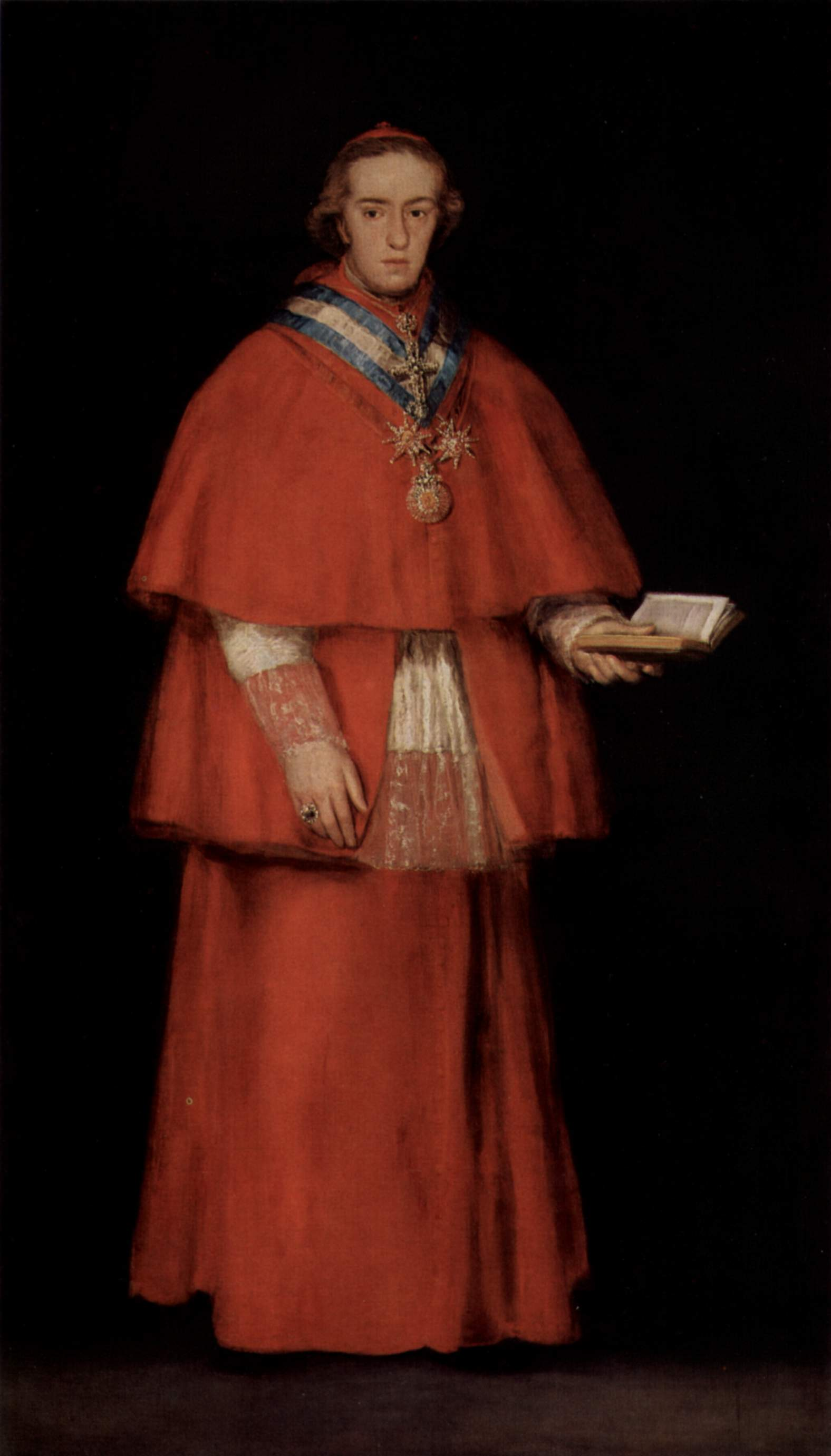 Portrait of Cardinal Luis María de Borbón y Vallabriga (1777-1823)label QS:Len,"Portrait of Cardinal Luis María de Borbón y Vallabriga (1777-1823)" label QS:Lde,"Porträt des Kardinals Luis Maria de Borón y Vallabriga"